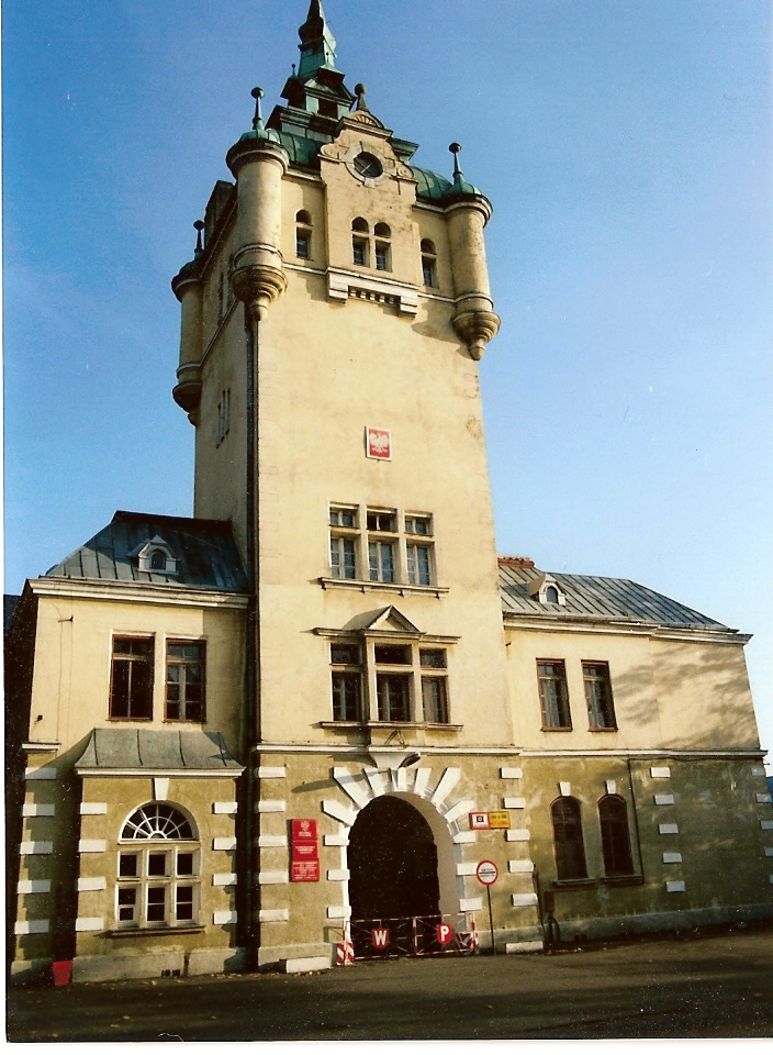 Brama wjazdowa do koszar w Trzebiatowie